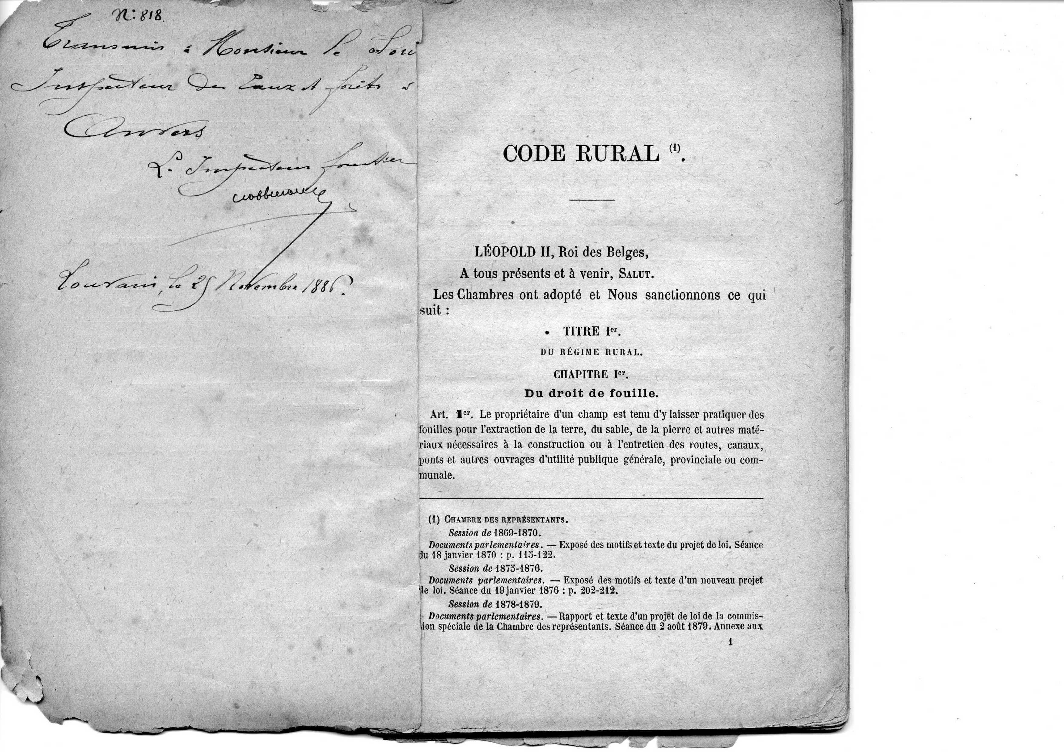 Legxolibro pri kamparaj situacioj en Belgujo - Eldono de la jaro 1886 - pagxo 1